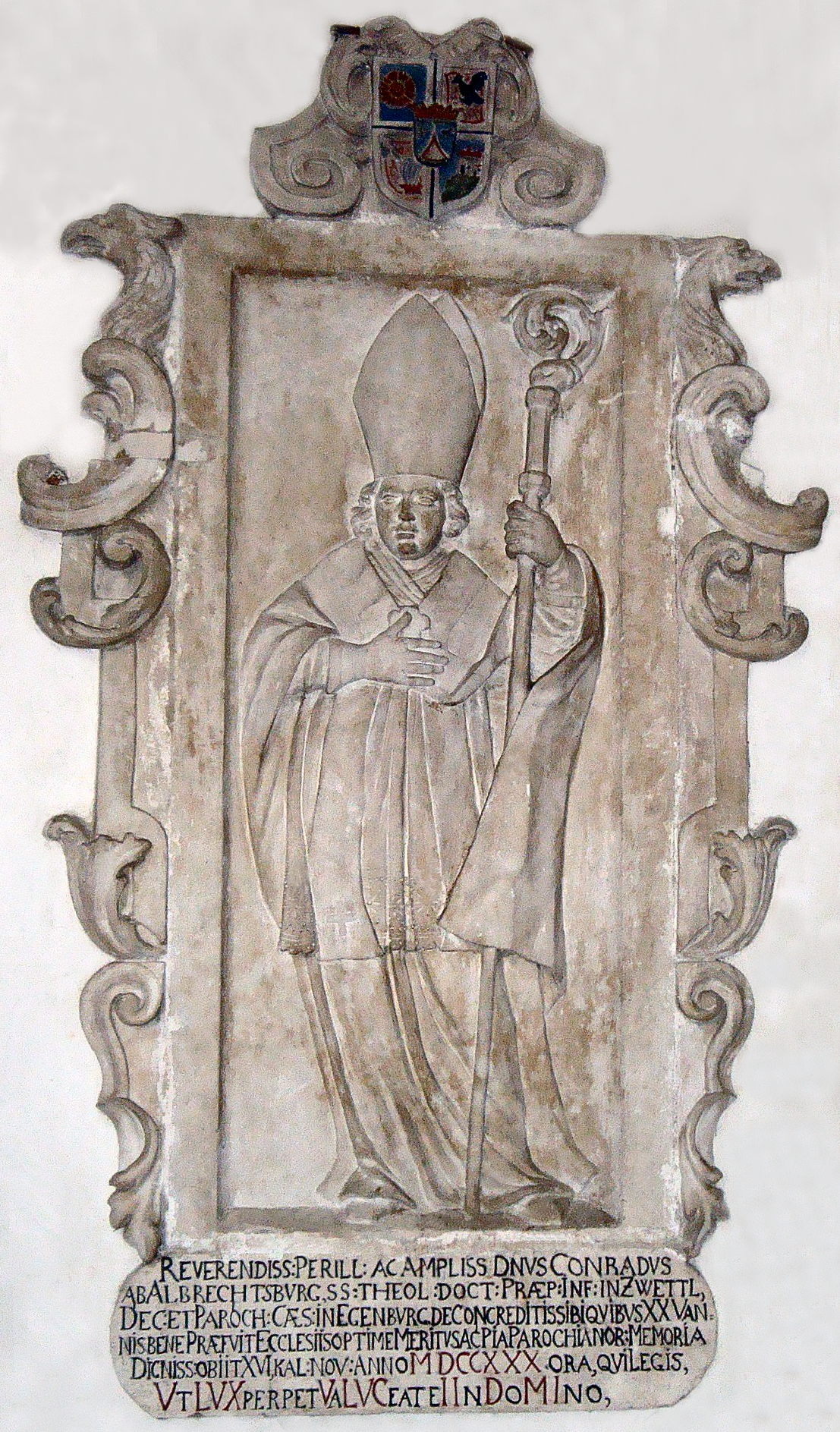 Epitaph des des infulierten Probstes Conrad Ferdinand Albrecht von Albrechtsburg 1730